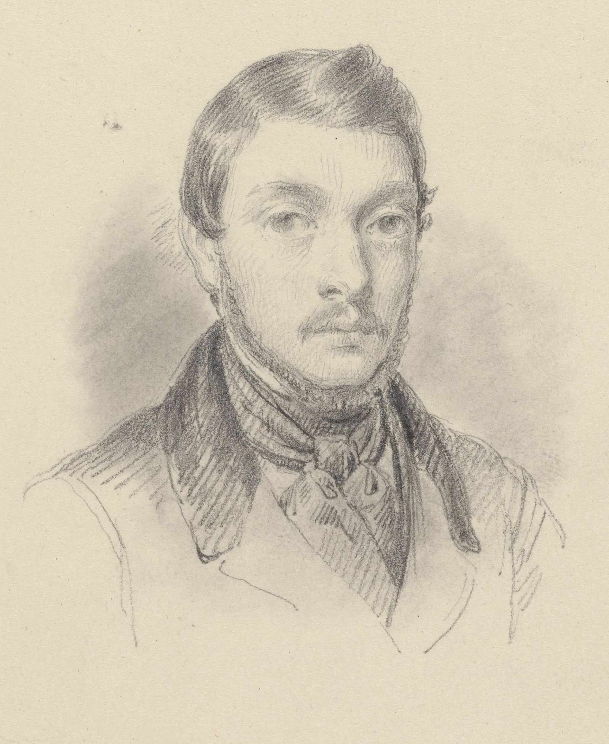 Ontwerp voor een prent.